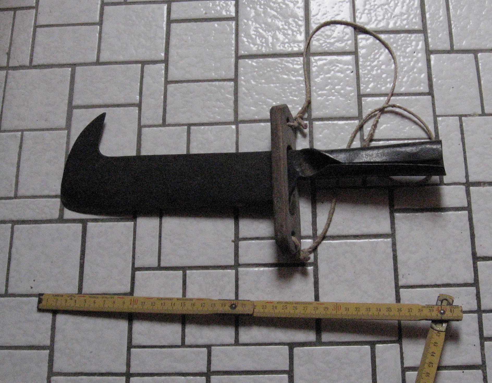 Ein sogenannter „Schnaber“, ein Haumesser, das zur Kleinhacken von kleinen Zweigen u.Ä. für Anfeuerholz früher gerne benutzt wurde. Hier ein Exemplar von der Ilshofener Ebene mit vorne überragender Spitze und hohlem Metallgriff, aus einem Stück geschmiedet. Es steckt in einem geschlitztem Holzstück und konnte mit der anhängenden Schnur an einem Balkennagel o.Ä. aufgehängt werden.